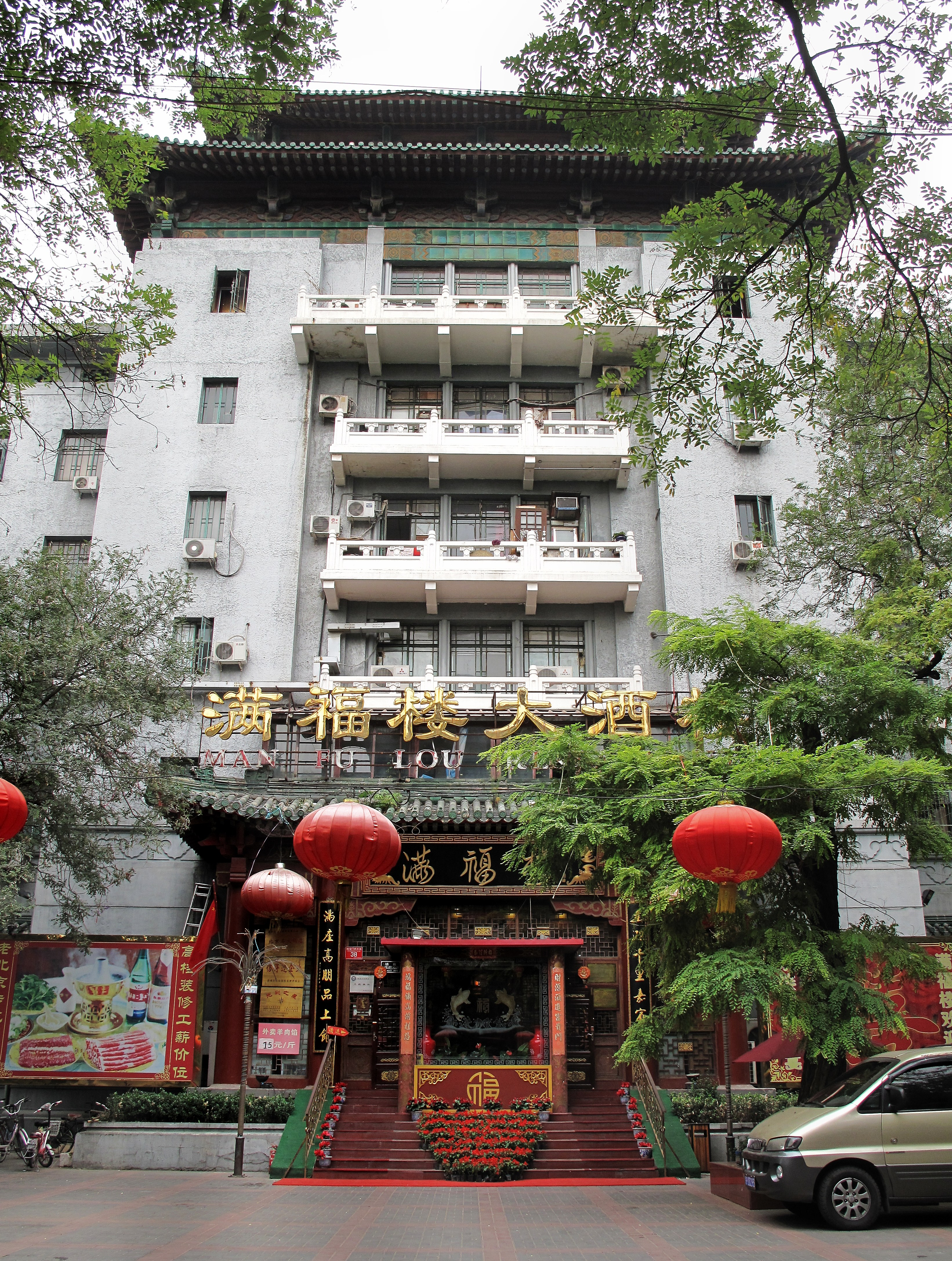 Big Restaurant